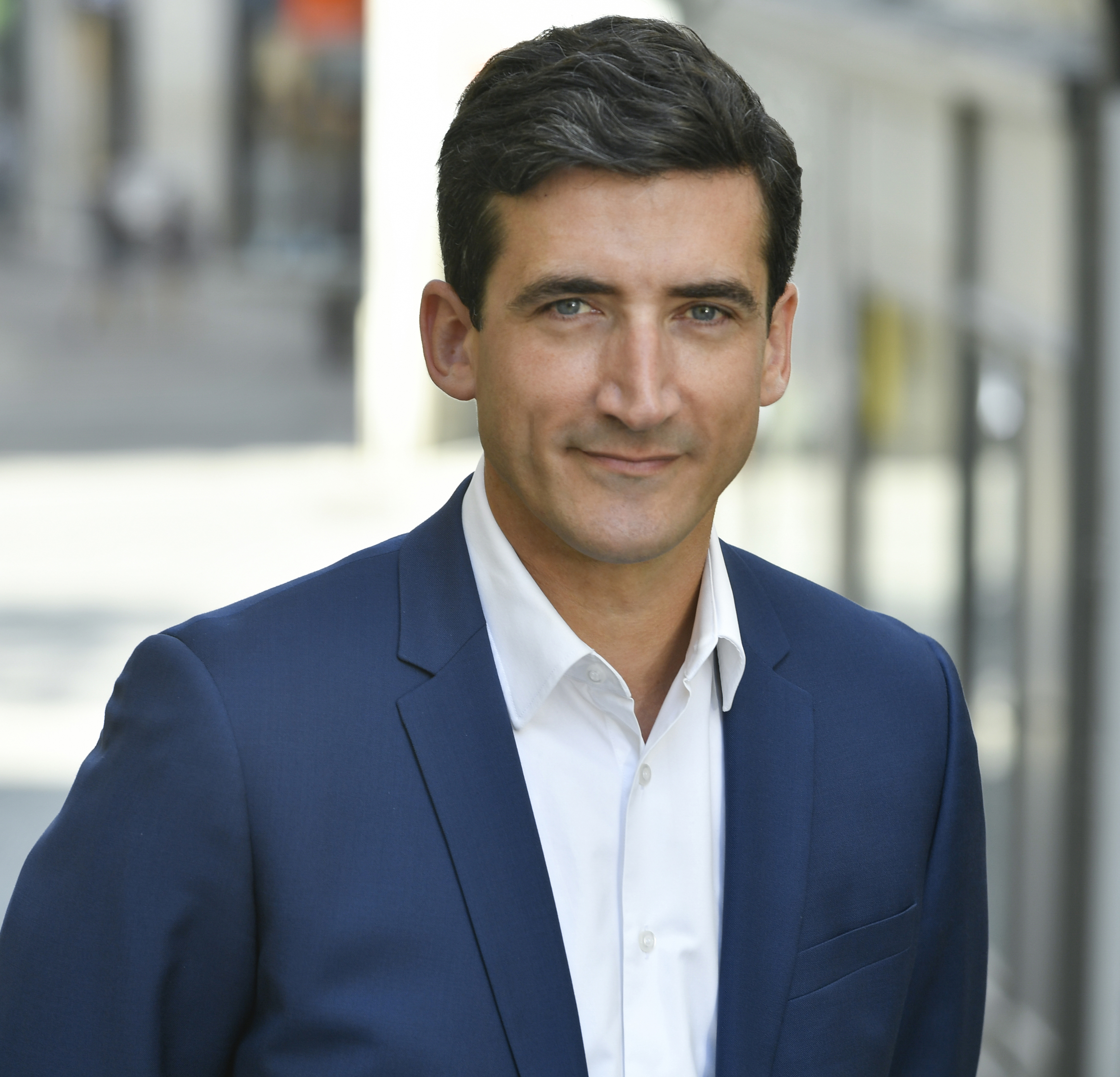 Portraits de M. Le Maire de Niort Jérôme Baloge